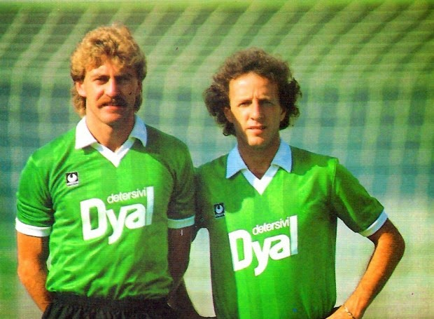 L'austriaco Walter Schachner (a sinistra) e il brasiliano Dirceu José Guimarães "Dirceu" (a destra), i due calciatori stranieri dell'Avellino nella stagione 1986-87.